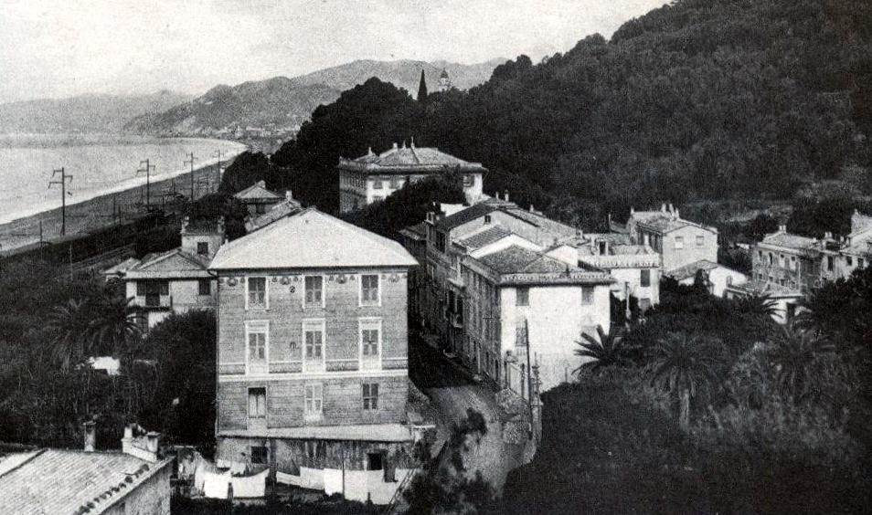 Panorama di inizio Novecento del borgo di Cavi, Lavagna, Liguria, Italia